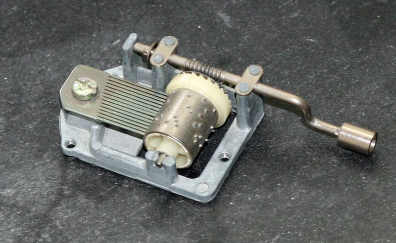 Speldosa som spelar "Internationalen"